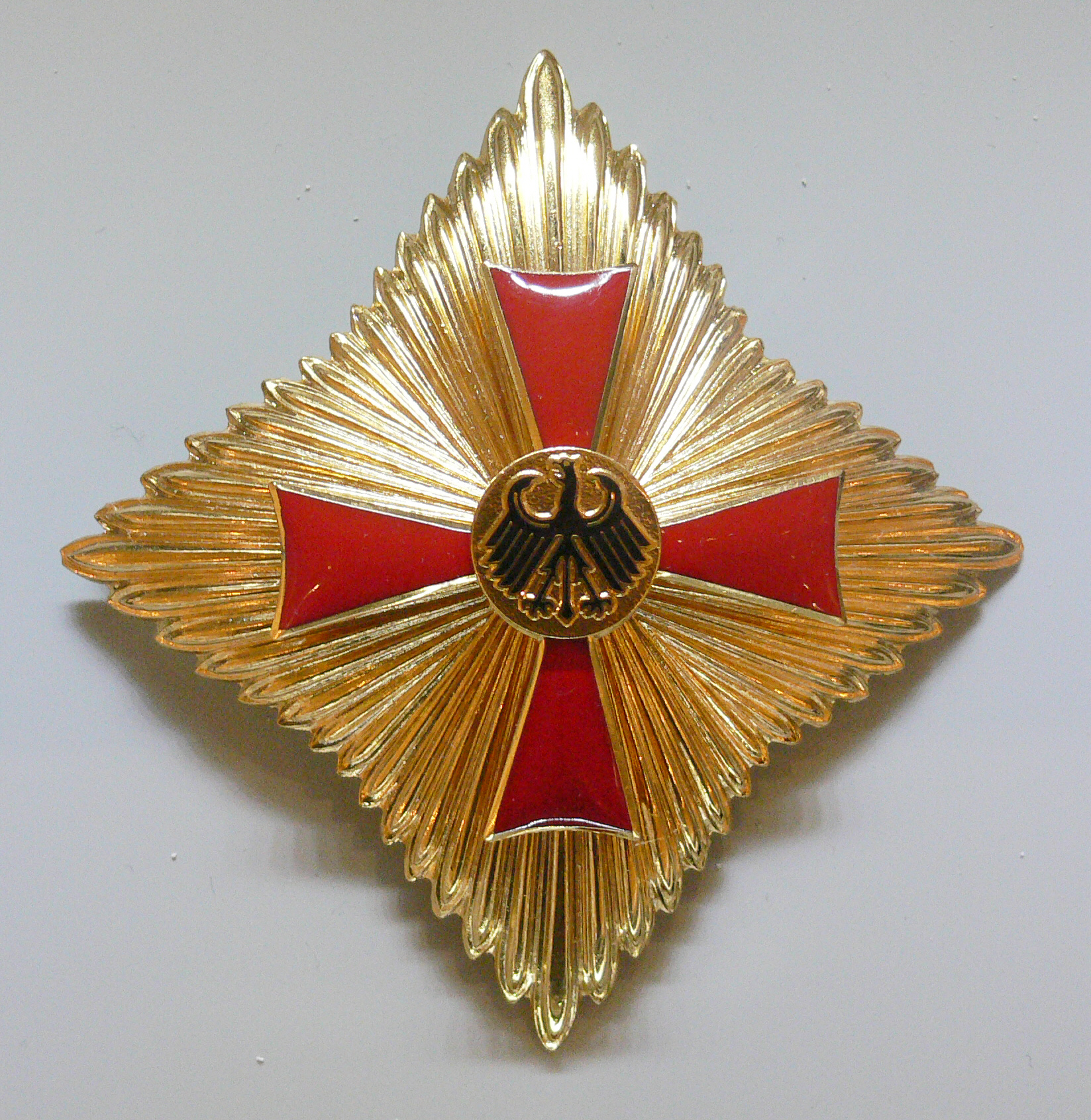 Stern des Bundesverdienstkreuzes mit Stern